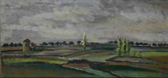 Llanuras de Carrascal, óleo sobre lienzo 1960